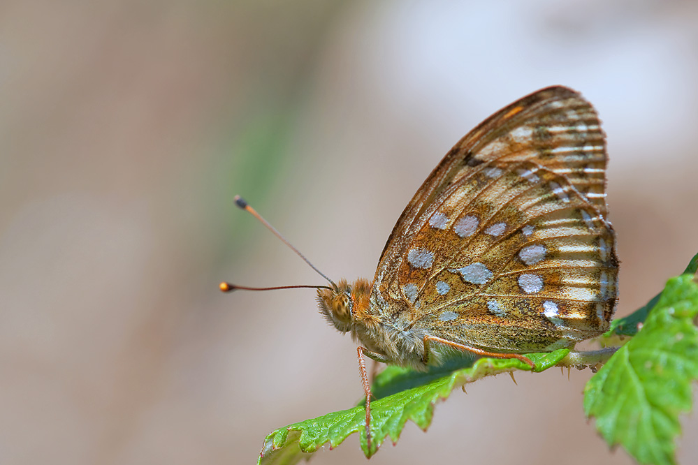 Großer Perlmutterfalter (Argynnis aglaja)